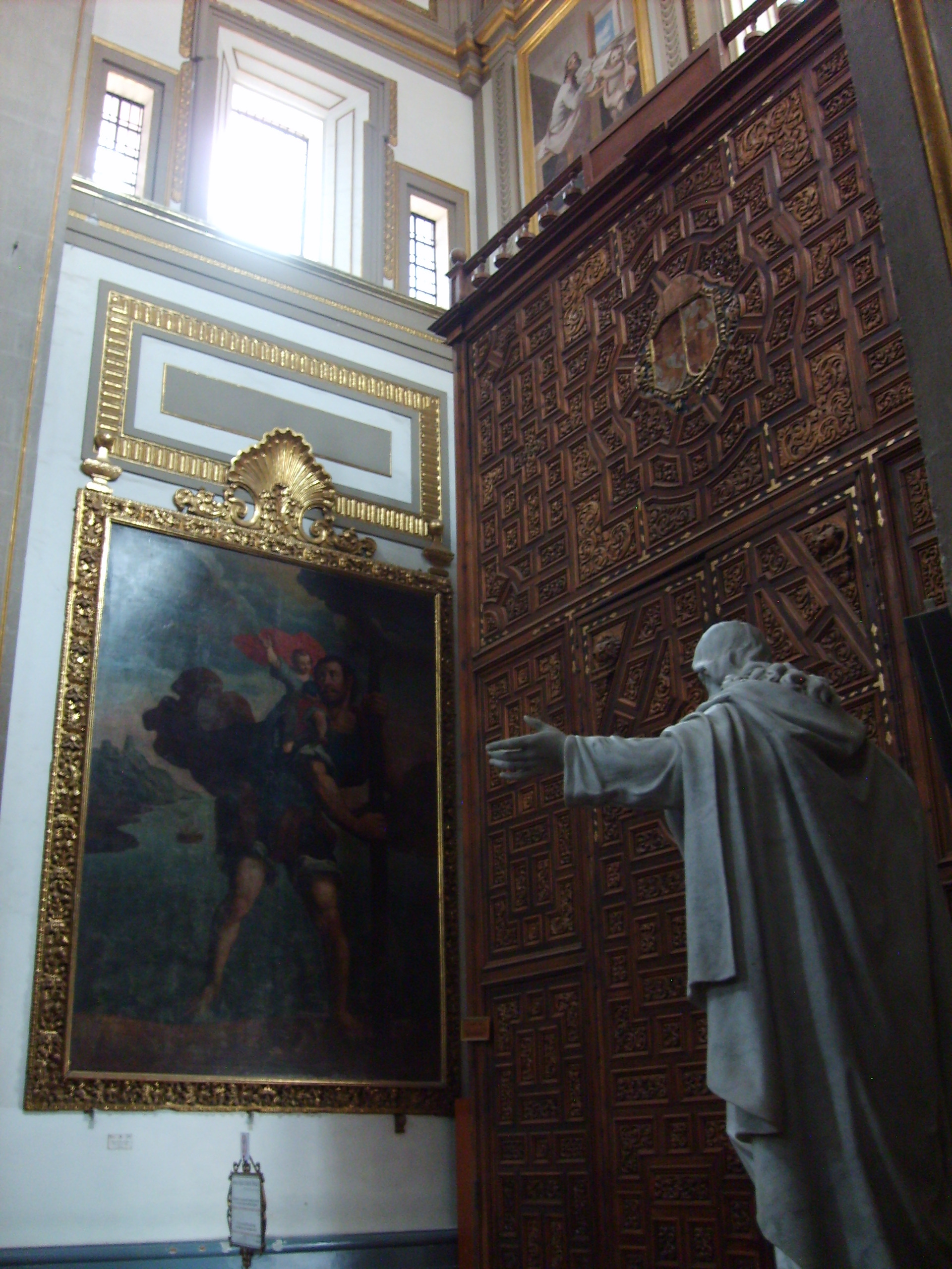 Transepto de la Catedral de Puebla, lado Norte.